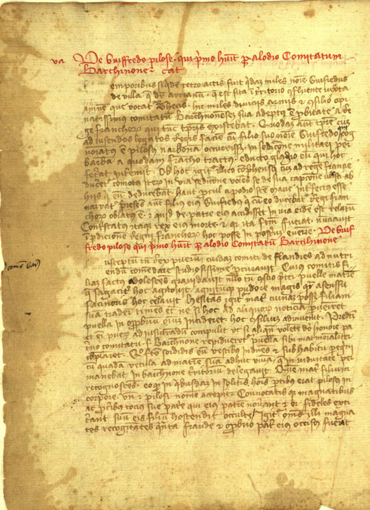 Llegenda de Guifré el Pilós. Gesta Comitum Barchinonensium, crònica catalana escrita originàriament en llatí per monjos del Monestir de Santa Maria de Ripoll. Fou redactada a finals del segle XII i continuada posteriorment amb altres addicions.